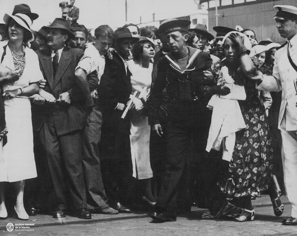 Entierro de Carlos Gardel en el cementerio de la Chacarita, 1936. "Los desmayos se sucedieron en gran número a causa de los apretones. En la foto se ve a una señora a punto de desvanecerse y es auxiliada".